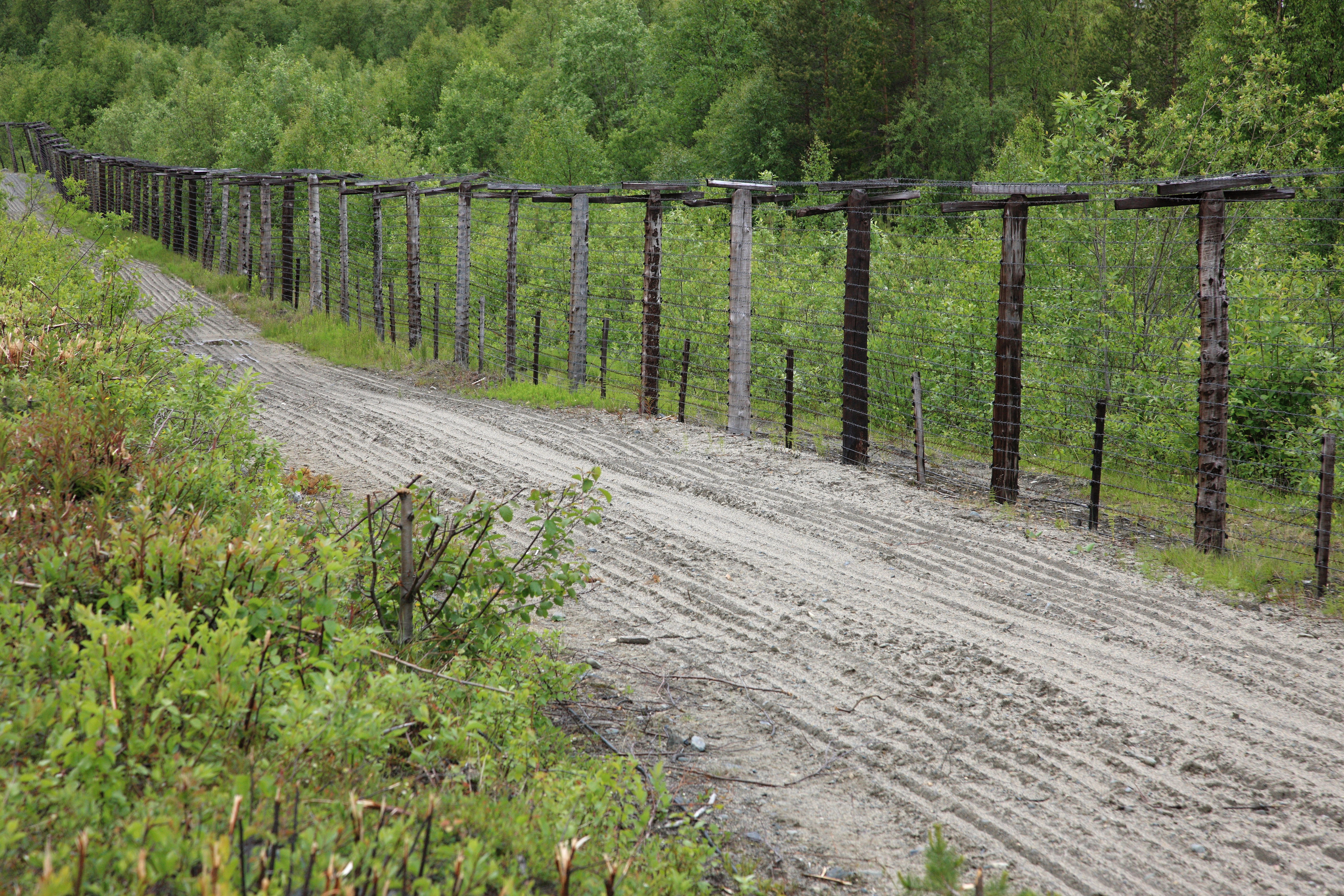 Železná opona na norsko-ruské hranici (elektrická signální stěna S-175 GARDINA).